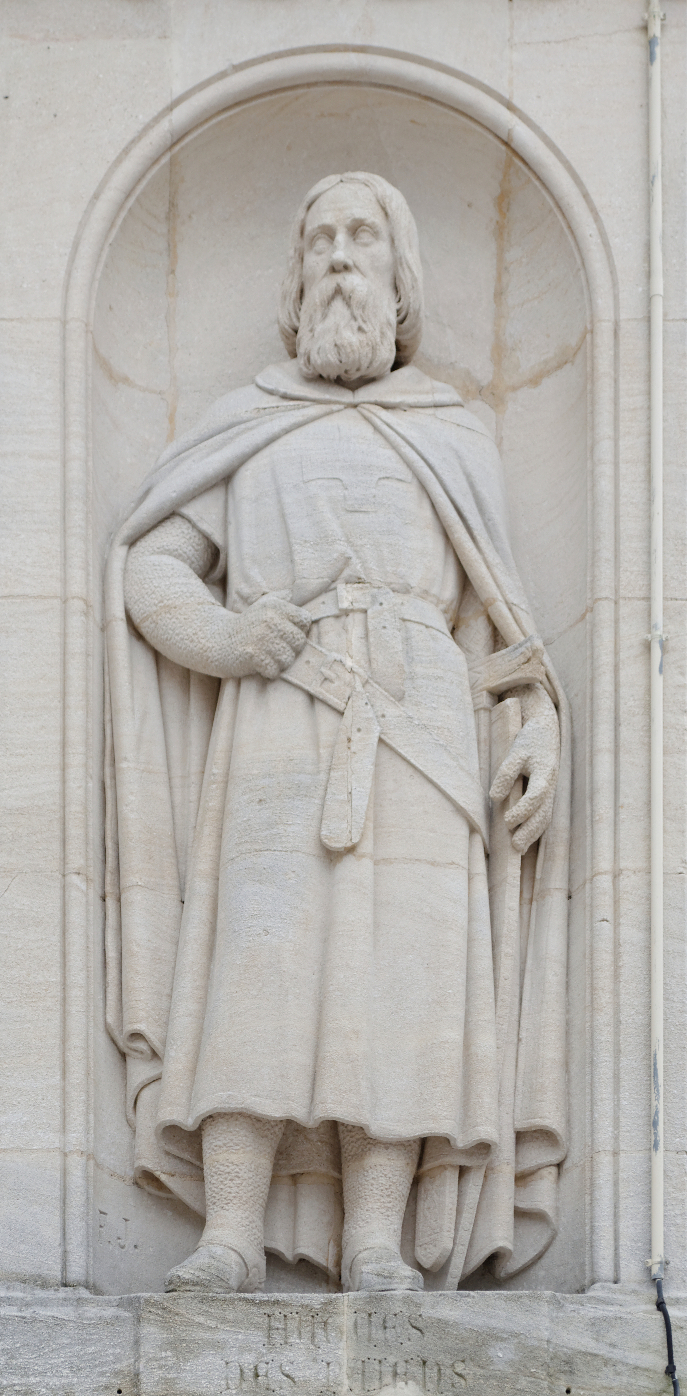 Hugues de Payens : fondateur et premier maître de l'ordre du Temple